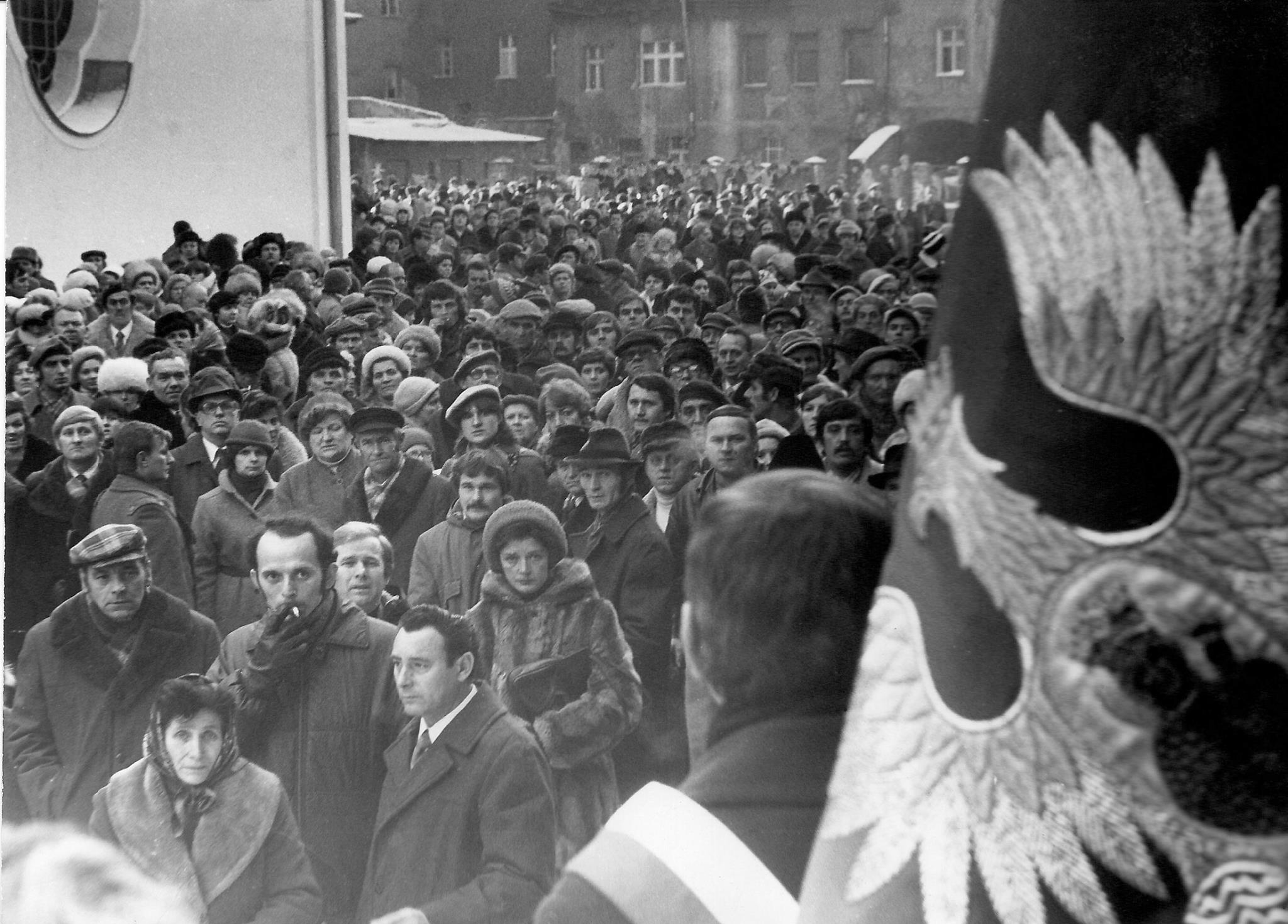 Poświęcenie sztandaru Komisji Zakładowej NSZZ „S“ ZPB „Frotex“ przez ks. biskupa Wacława Wyciska.